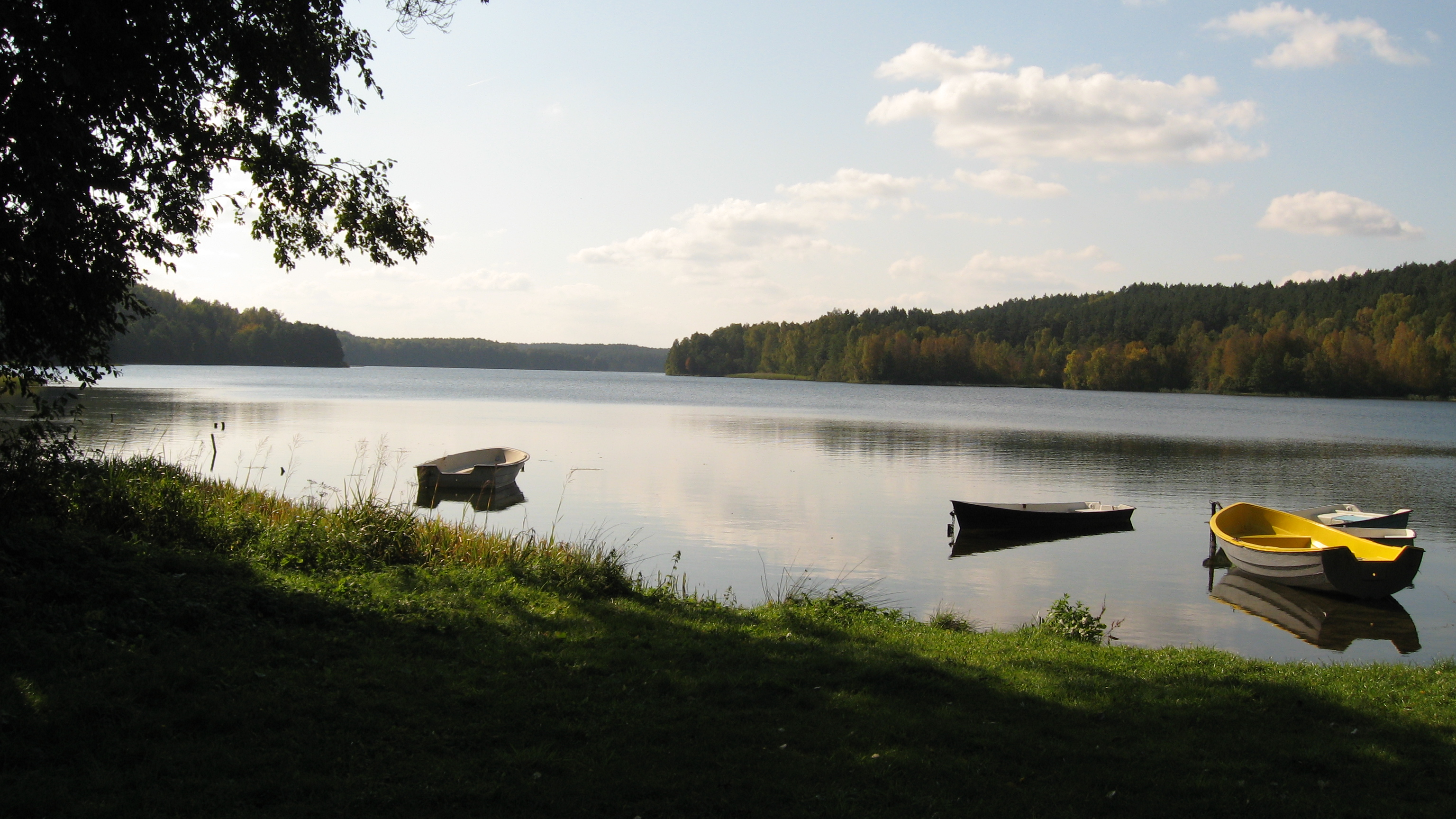 Jezioro Dąbrowskie - Gołubie